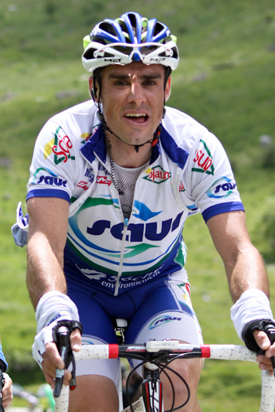 Etape 6 (Col des Aravis) du Critérium du Dauphiné 2011